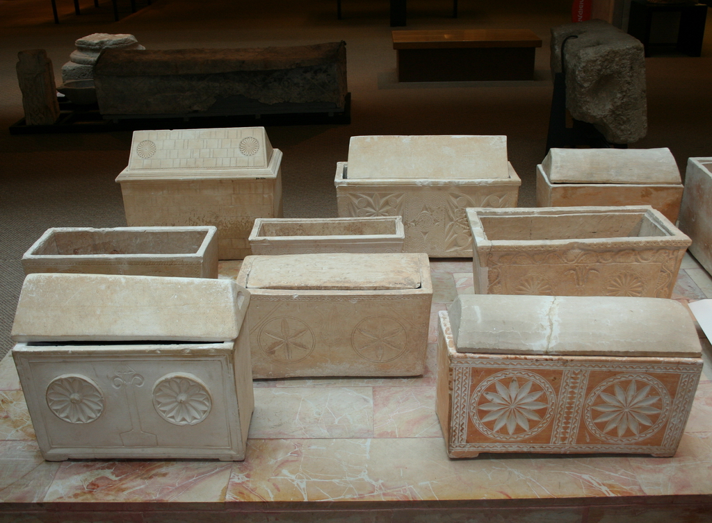 גלוסקמא מאוסף מוזיאון הכט, Ossuaries at Hecht Museum, Haifa University, Israel.